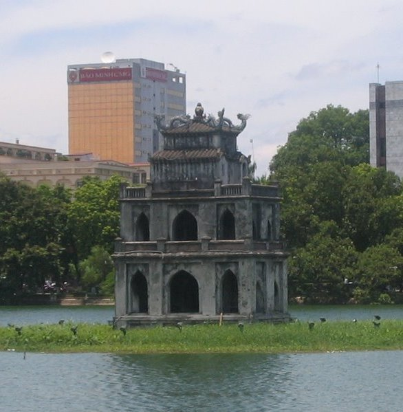 Hoan Kiem Lake